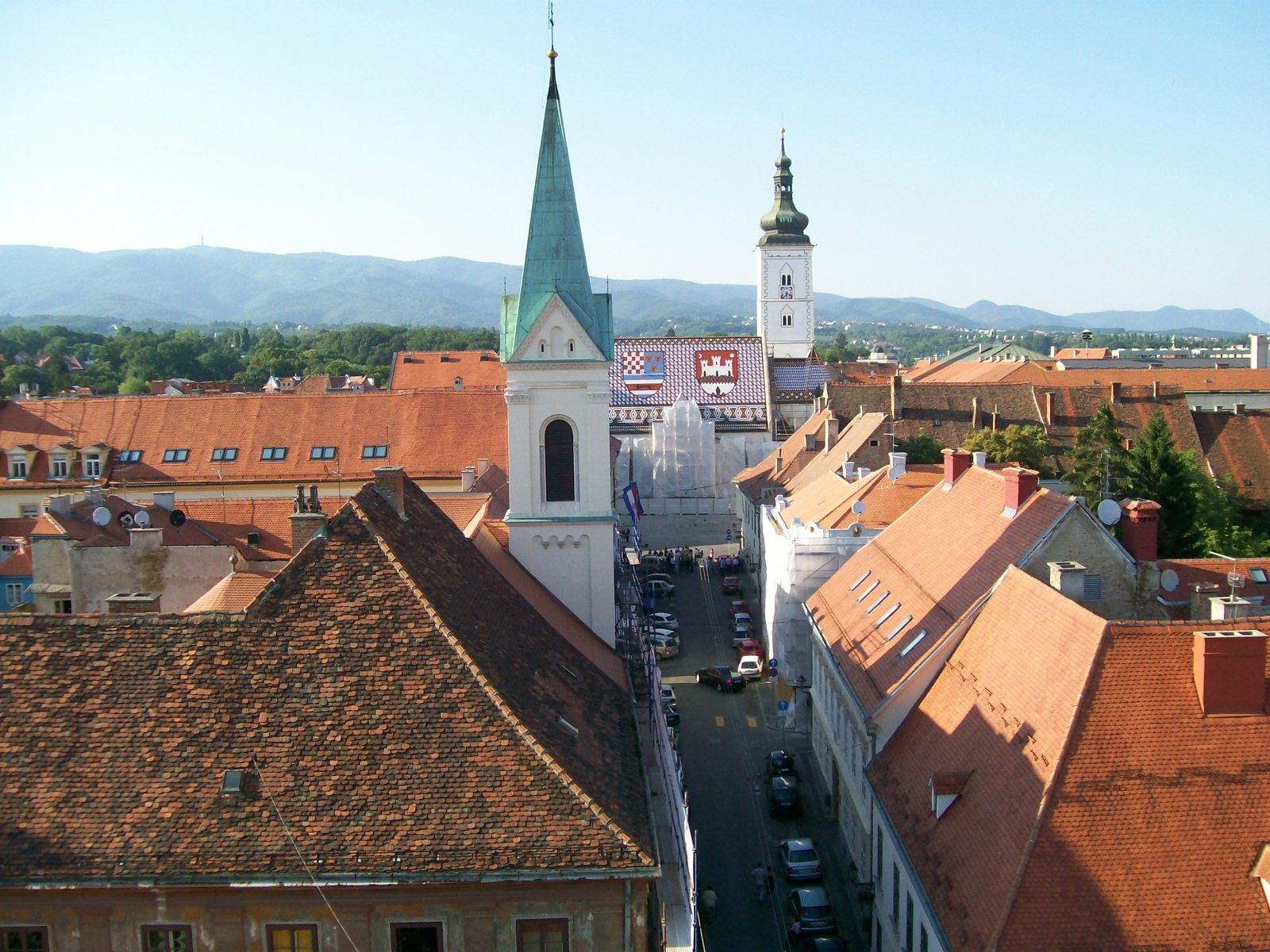 Pogled s Lotrščaka na Markovu crkvu i Ćirilometodsku ulicu u Zagrebu